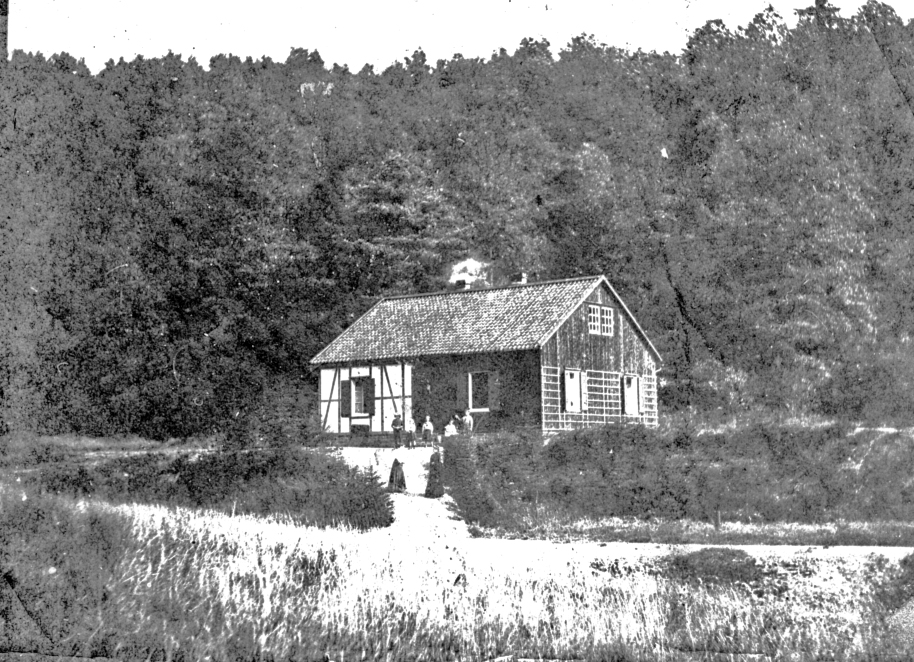 Steigerhaus am oberen Stollen der Grube Castor